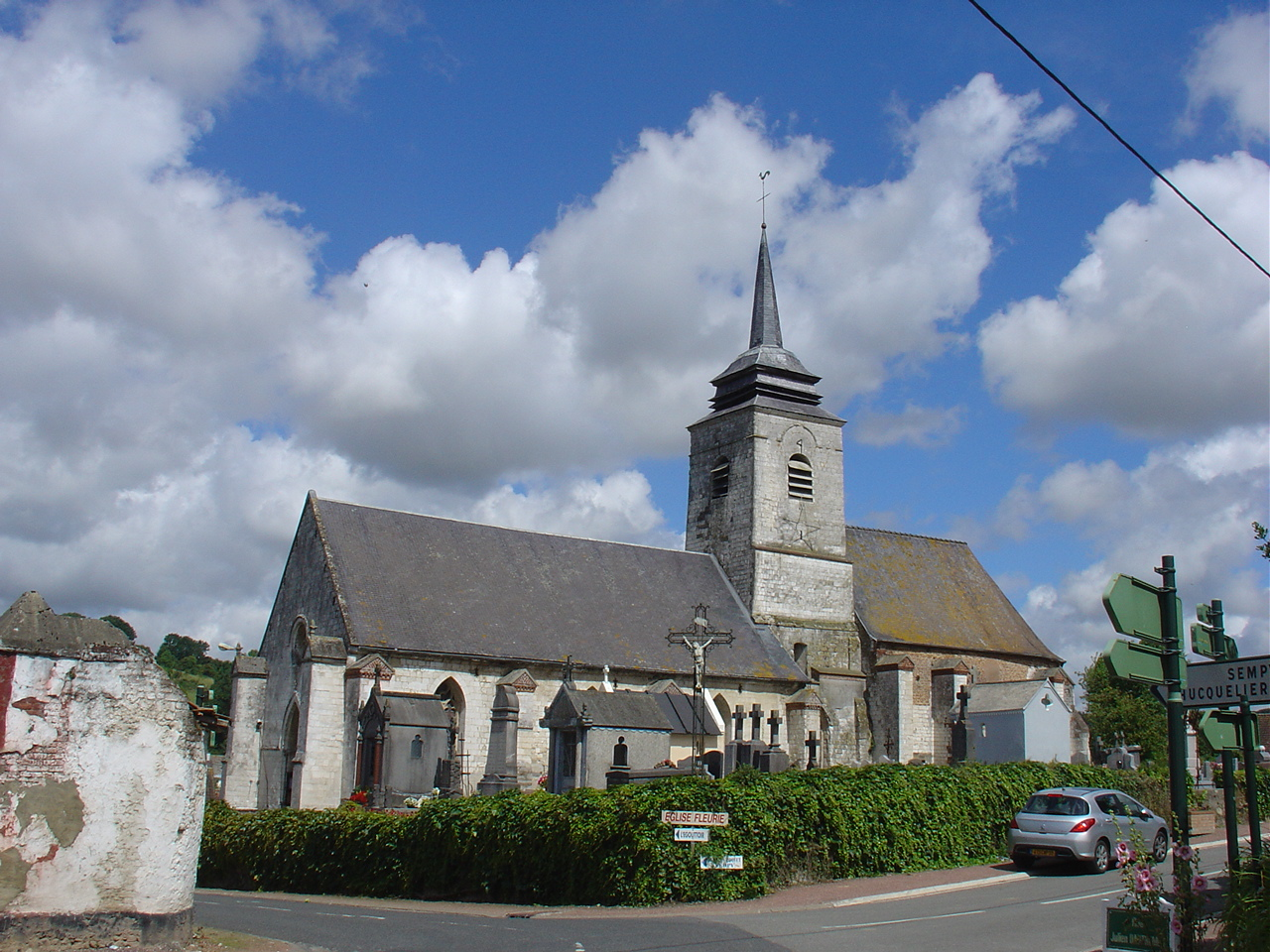 Église d'Aix-en-Issart